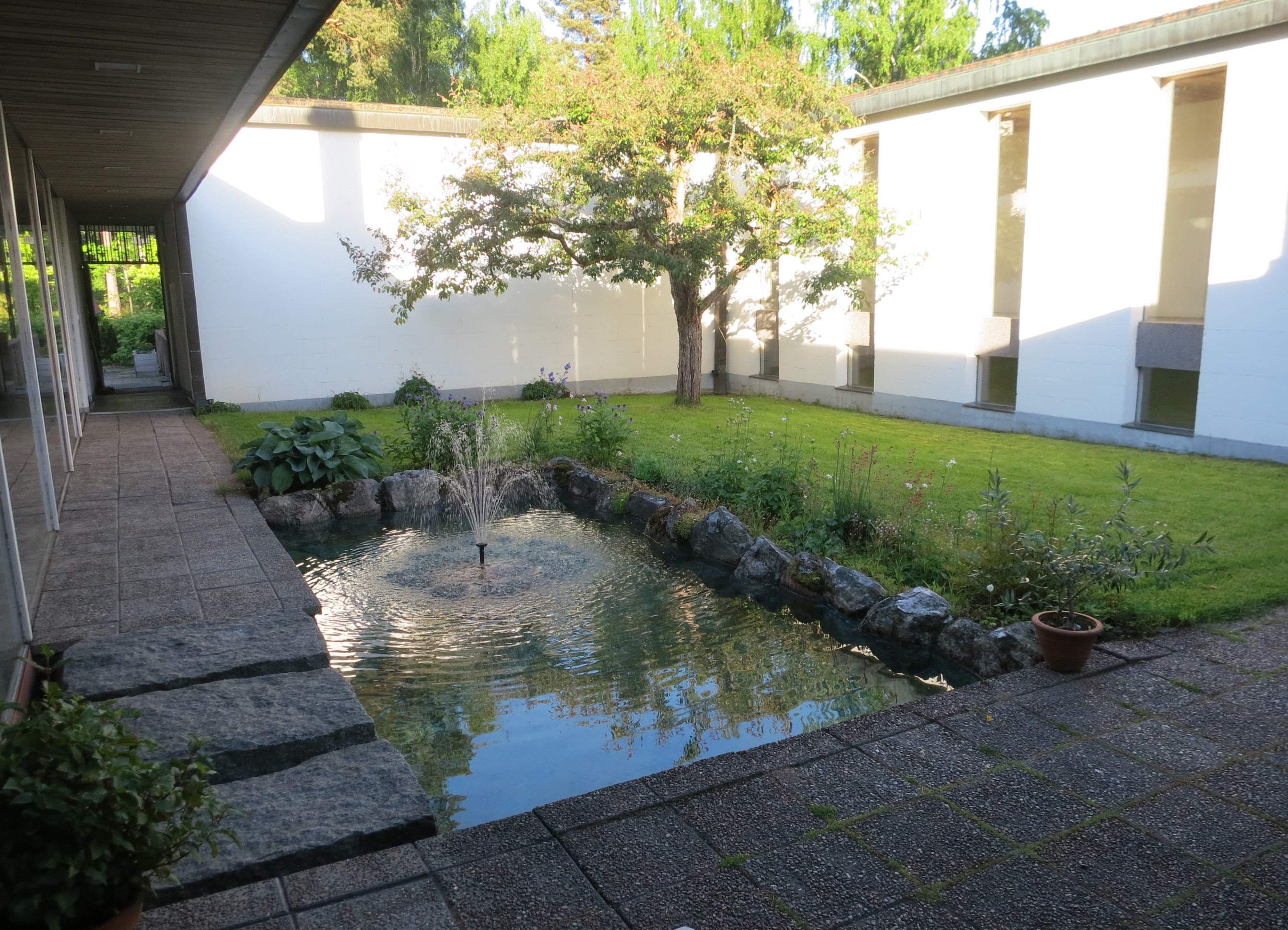 Retreatgården Berget utanför Rättvik i Dalarna